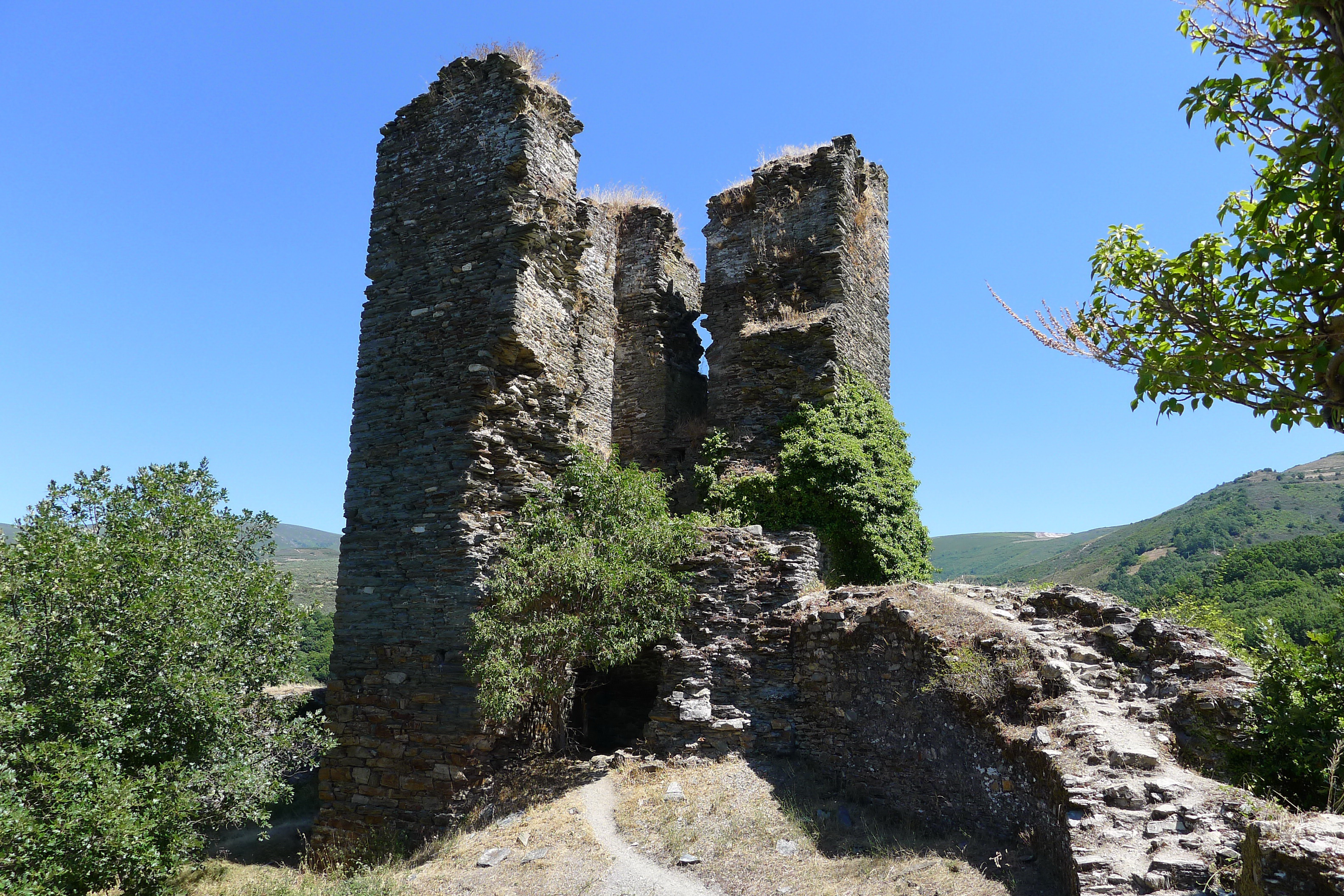 Castillo de Balboa 2011